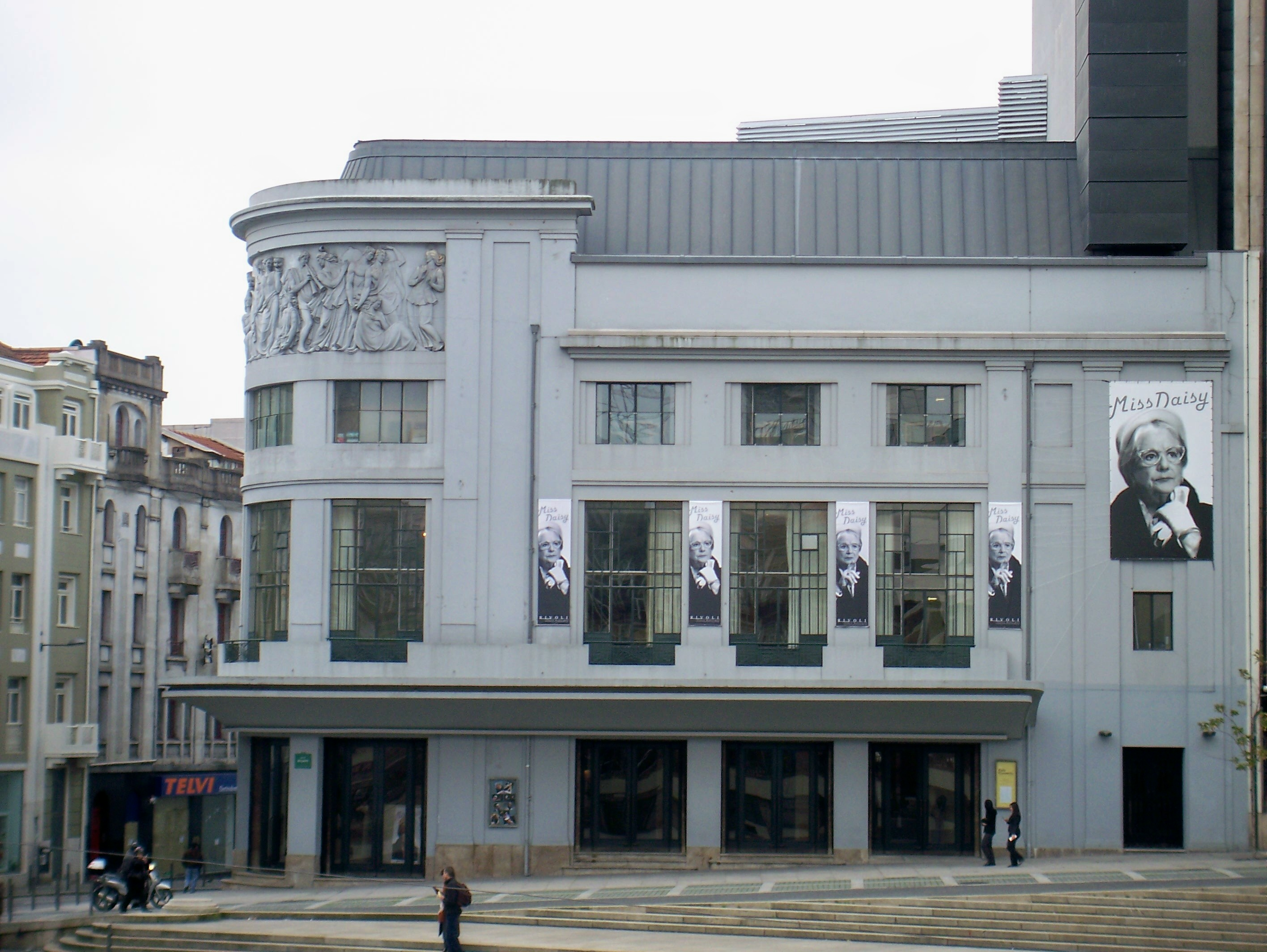 Porto